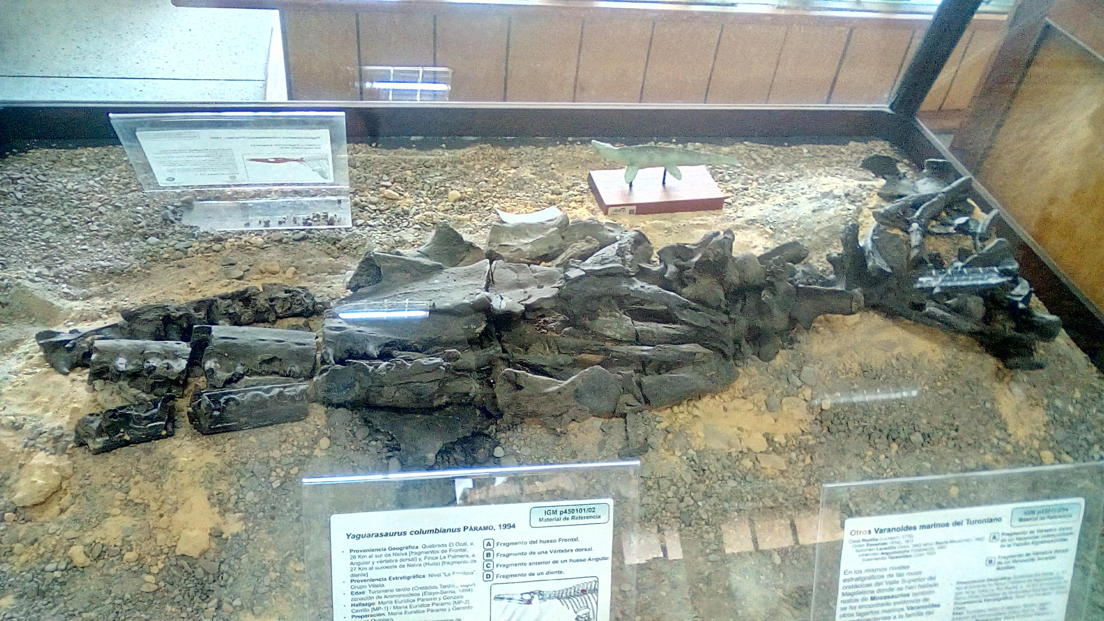 Cráneo desarticulado y vértebras cervicales del mosasáurido Yaguarasaurus columbianus. Museo Geólogico José Royo y Gómez, Bogotá.